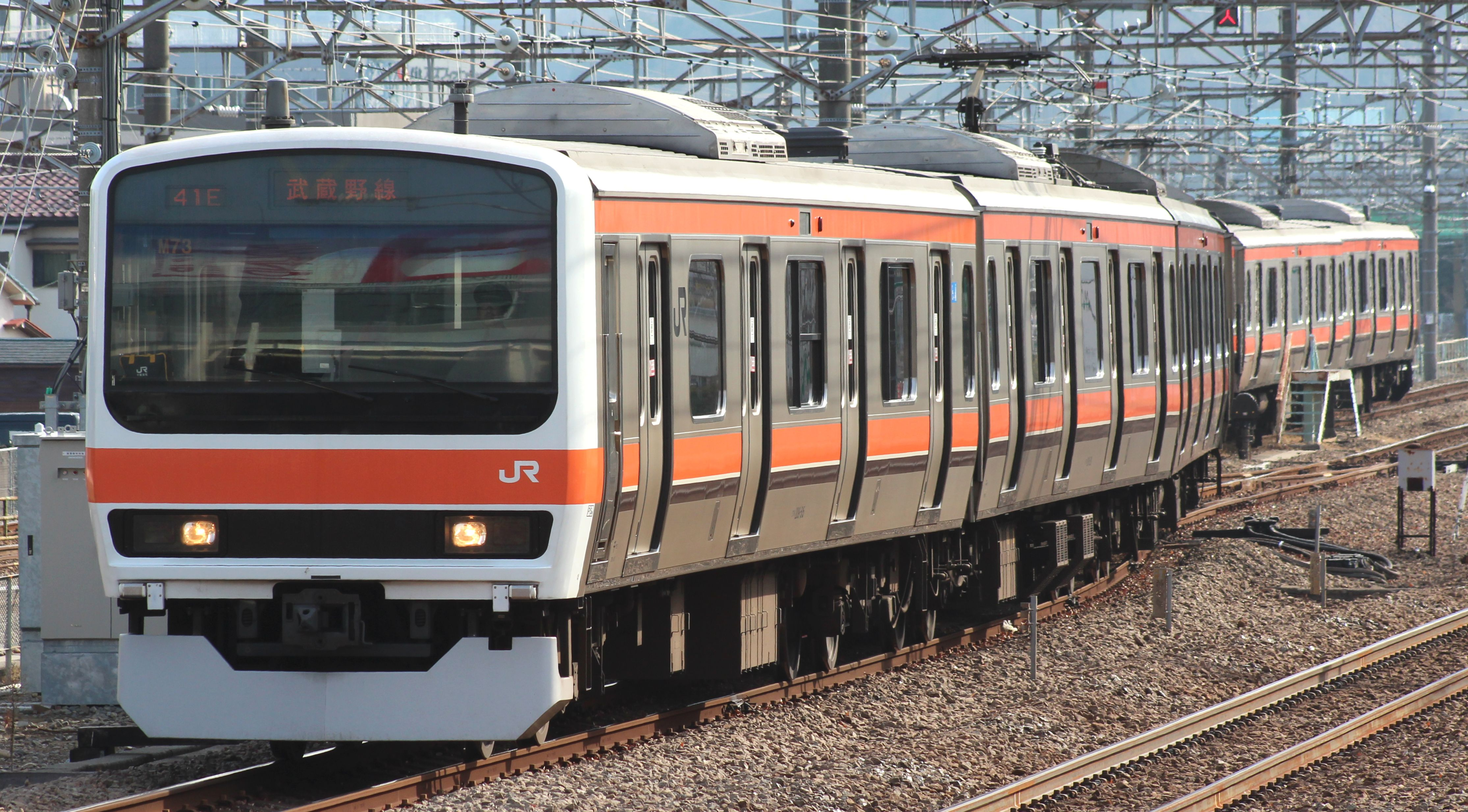 武蔵野線用209系500番台M73編成